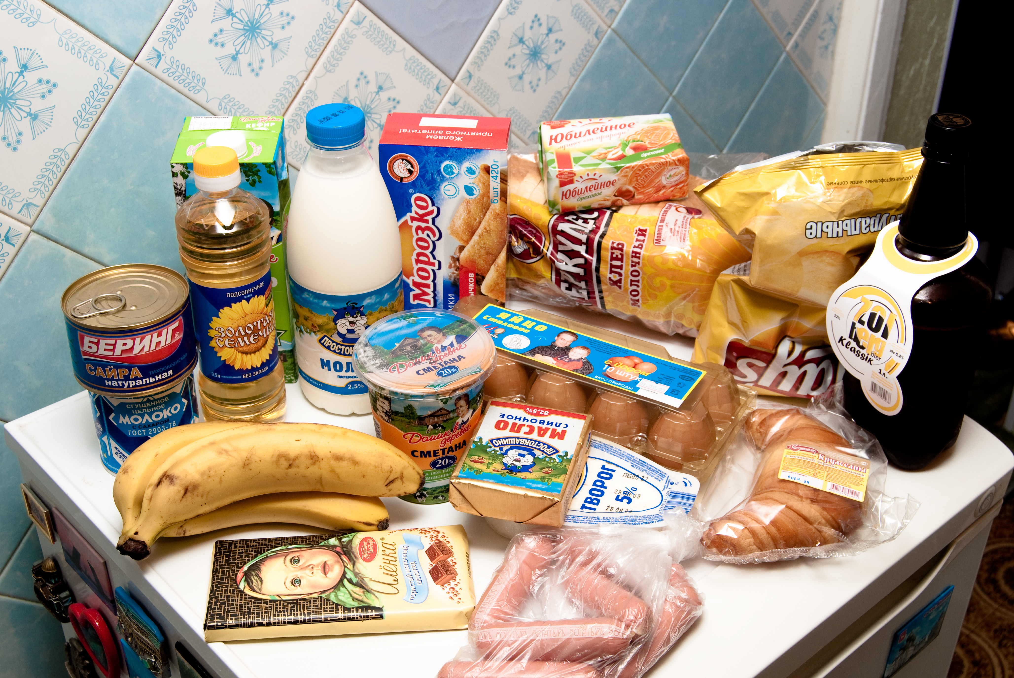 Купил по дороге домой. Еда снимает стресс